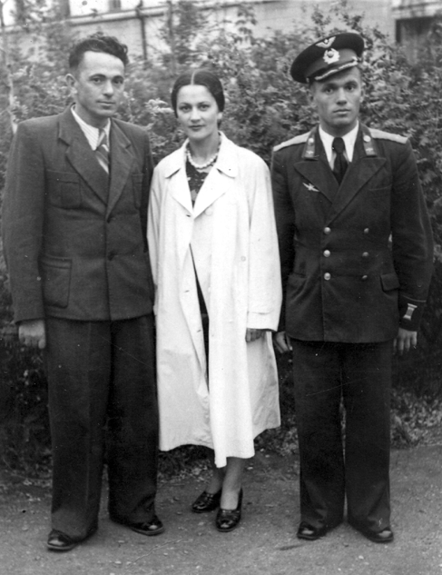 Иван Павлович с женой Венерой и племянников Василием